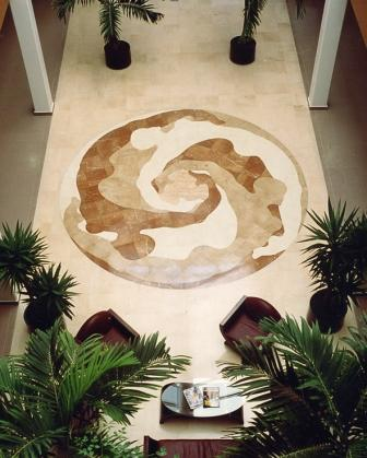 Floor_Mosaic